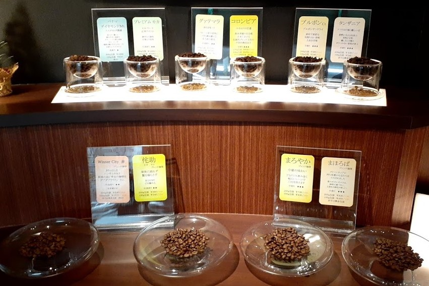 愛知県名古屋市瑞穂区弥富通2丁目4−2の七五書店にある喫茶店「まほろば珈琲館」。